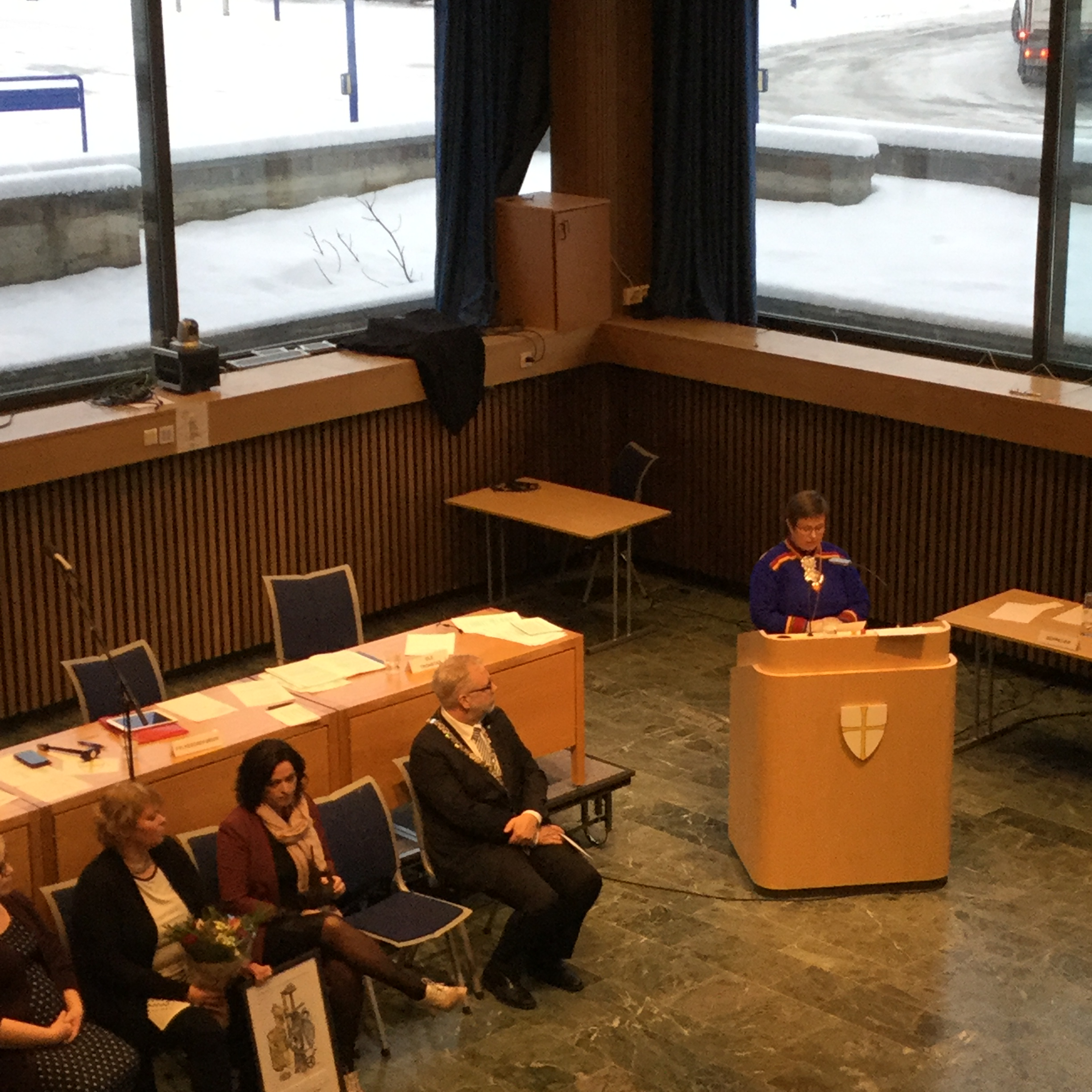 Fra utdeling av fylkeskulturprisen i Nord-Trøndelag 2017